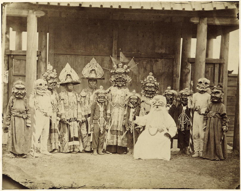 Церемония Цам в Гусиноозёрском дацане. 1880-е.